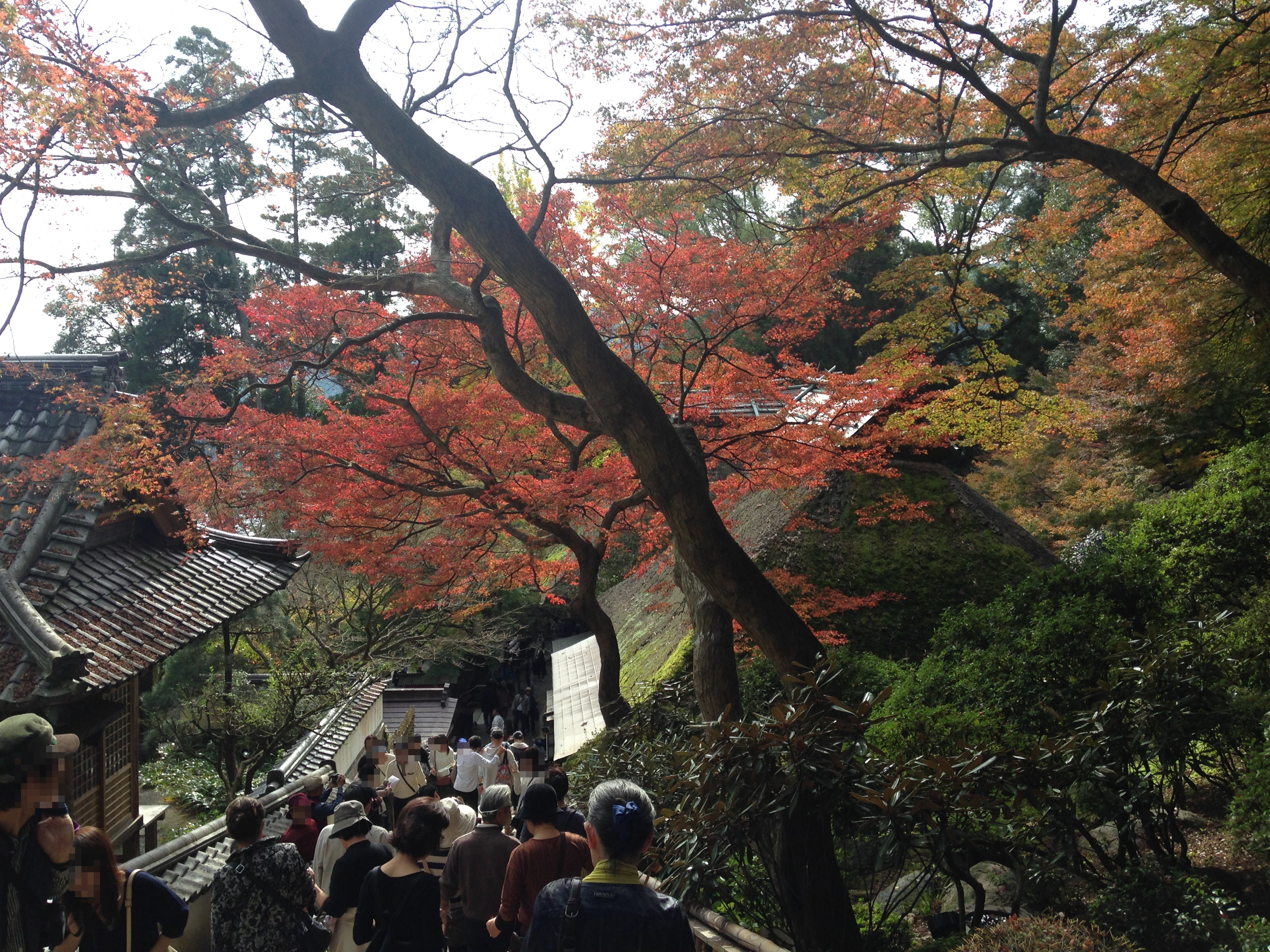 大興善寺本堂の茅葺き屋根と紅葉